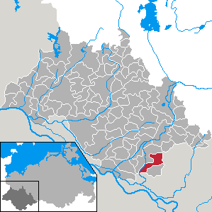 Milow in Mecklenburg-Vorpommern - district Ludwigslust